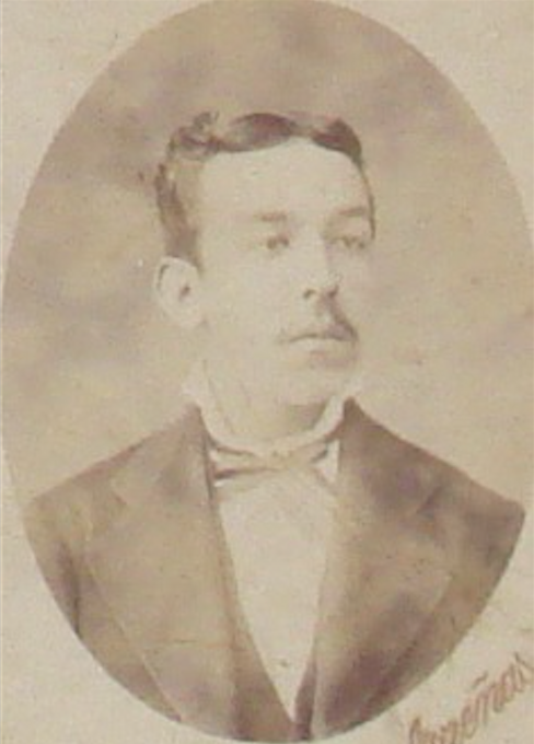 Eusebio Bosch i Humet, con 18 años